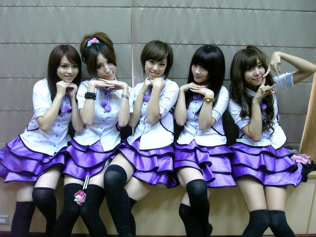 斯亞(Twinko)、瑤瑤、勇兔、玉兔、洪詩(Popu Lady)